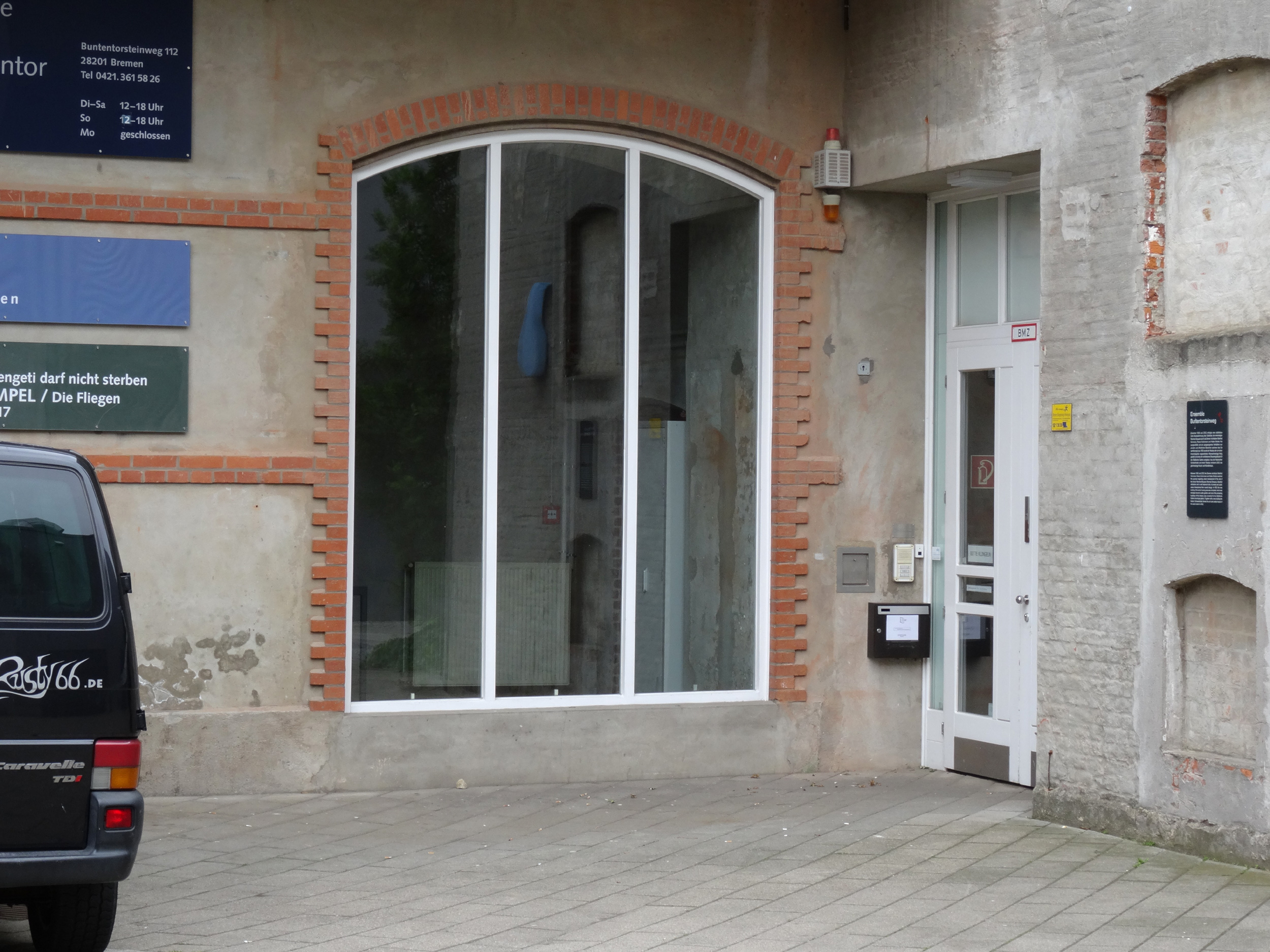 Infotafel: Ensemble Buntentorsteinweg 104-114 (Tafel 112)